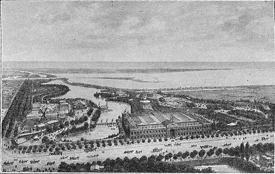 Udsigt over Vesterbrogade med Industriforeningens bygning og Udstillingen i 1872. Efter et litografi.